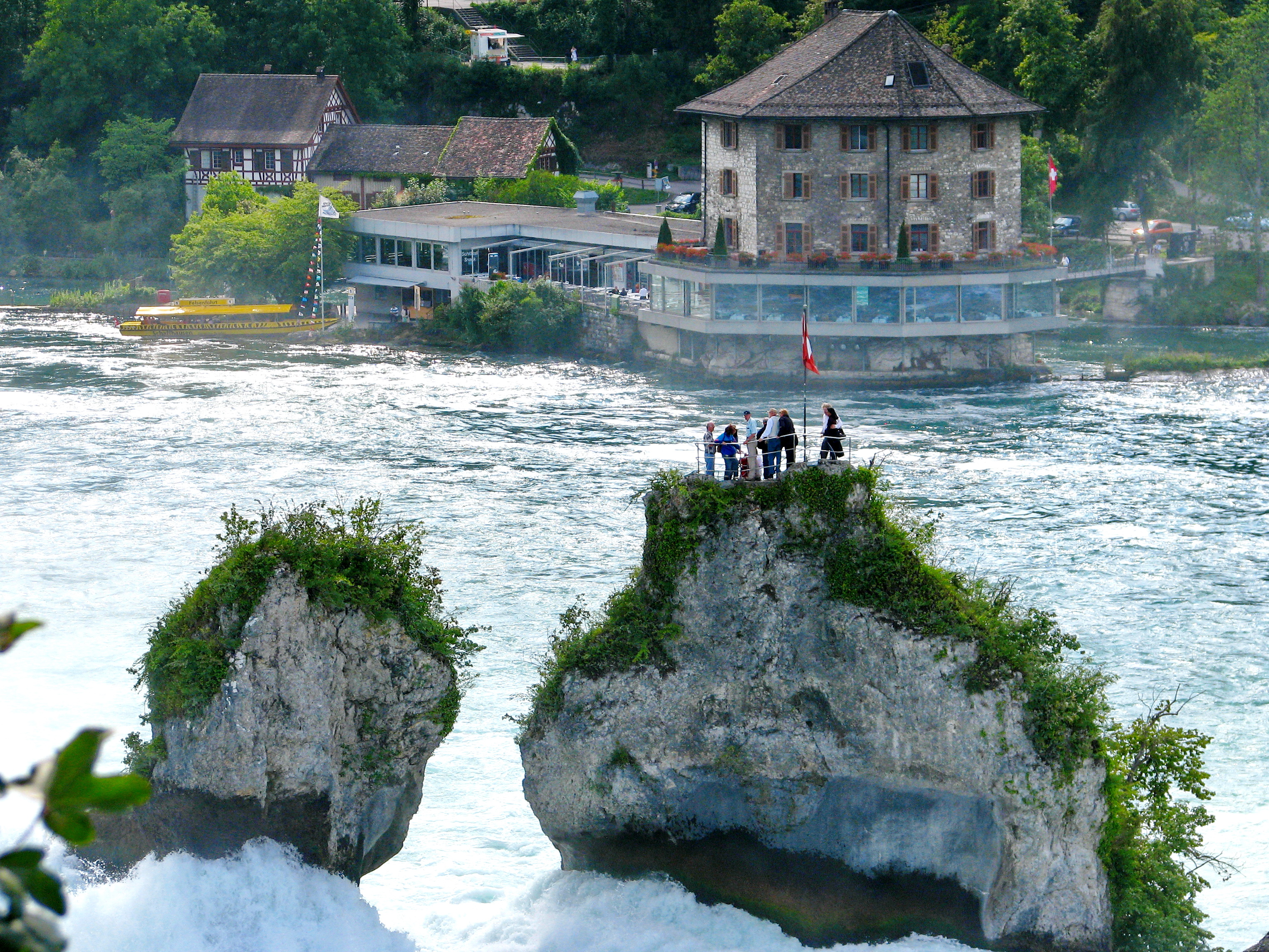 Rheinfall as seen from Neuhausen am Rheinfall (Switzerland), Schlössli Wörth in the background.